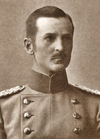 Friedrich von Pechmann (1862-1919), Bayerischer Freiherr und Generalmajor